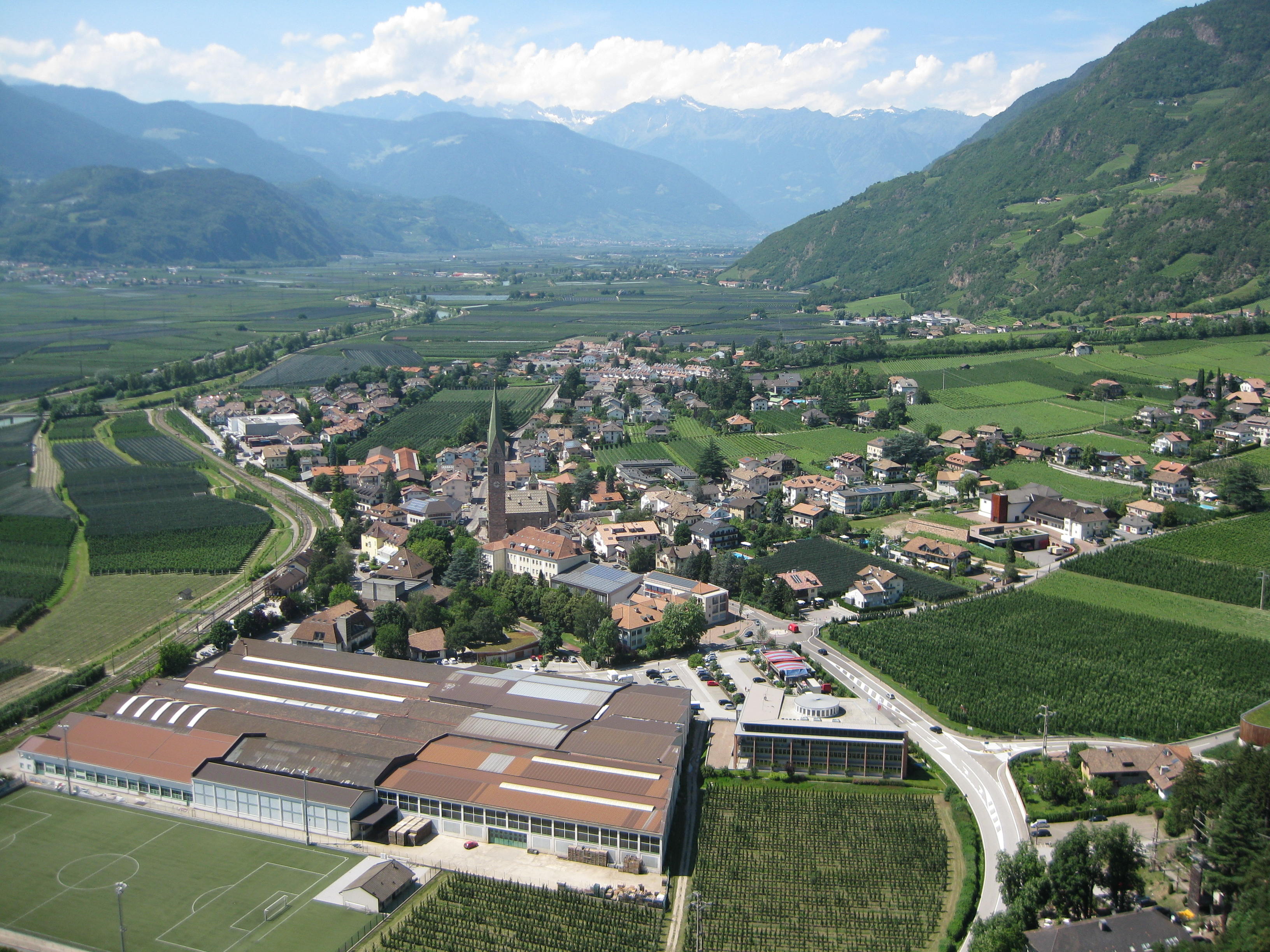 Terlan